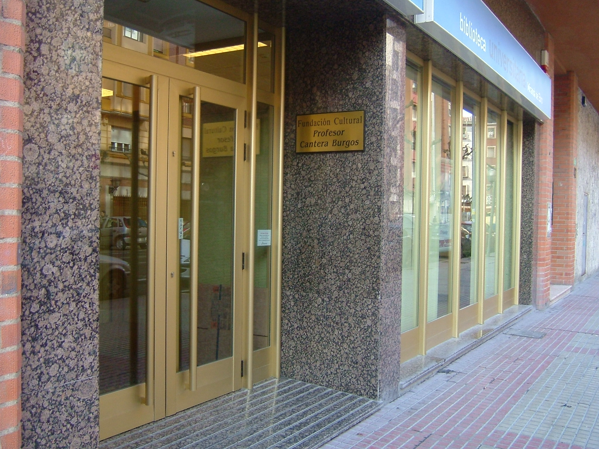 Segunda sede de la Fundación Francisco Cantera Burgos